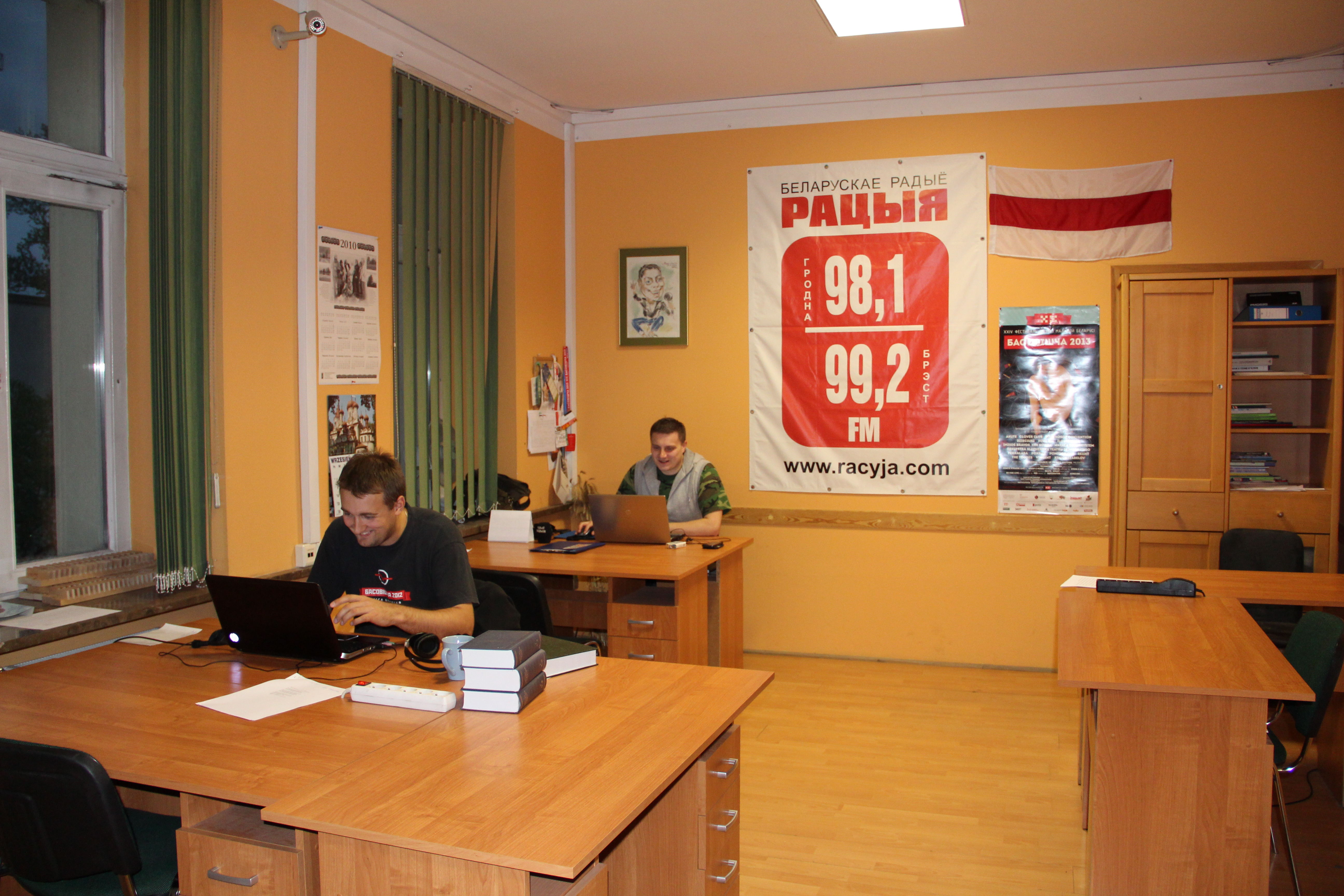 Siedziba Radia "Racja" w Białymstoku.